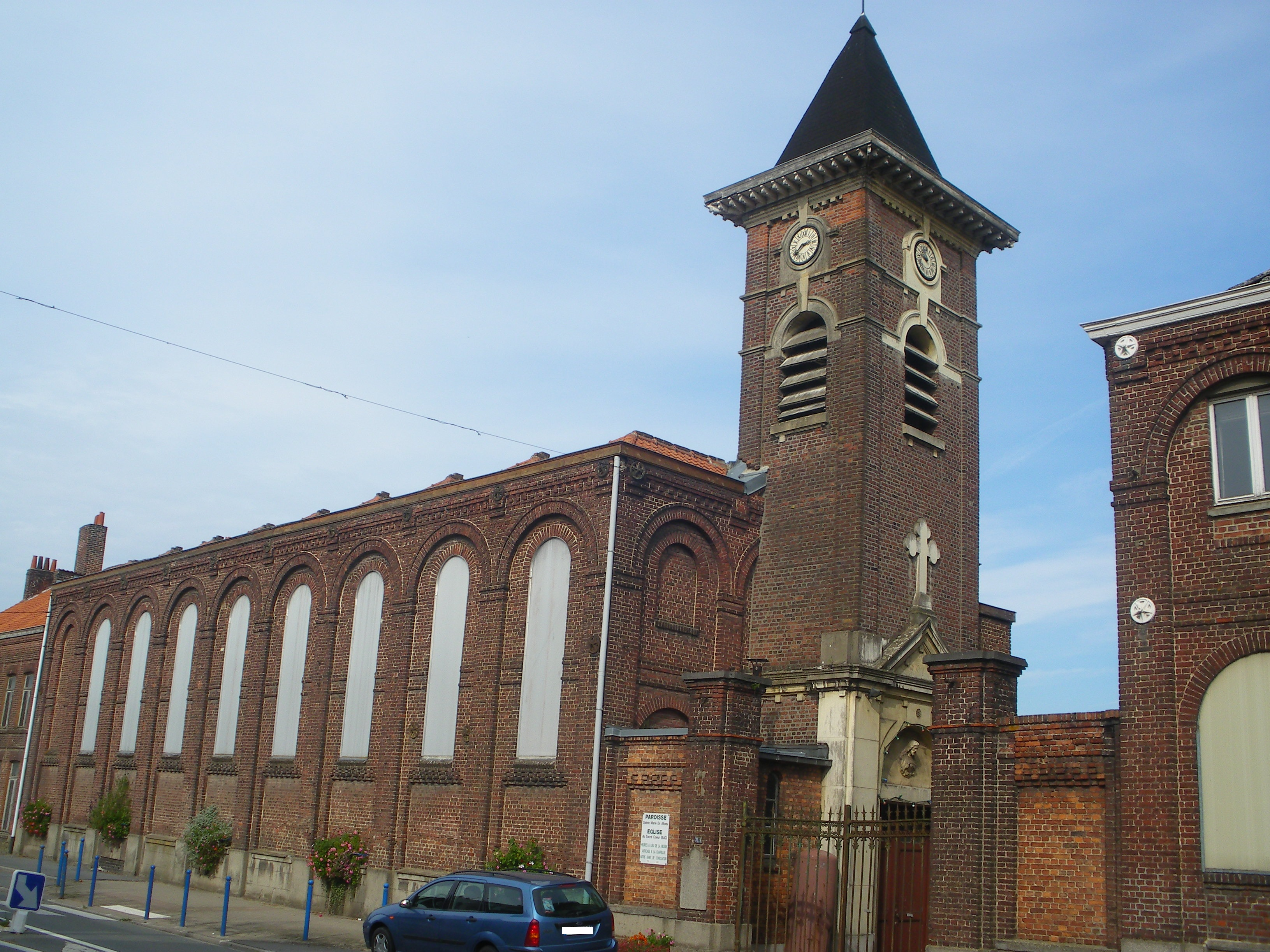 Vue de l'église de Bac-Saint-Maur à Sailly-sur-la-Lys.